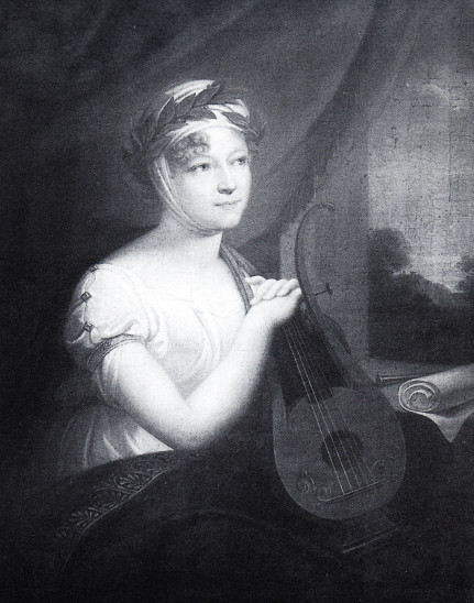 Ölbild, Ludwig Doell, 1817